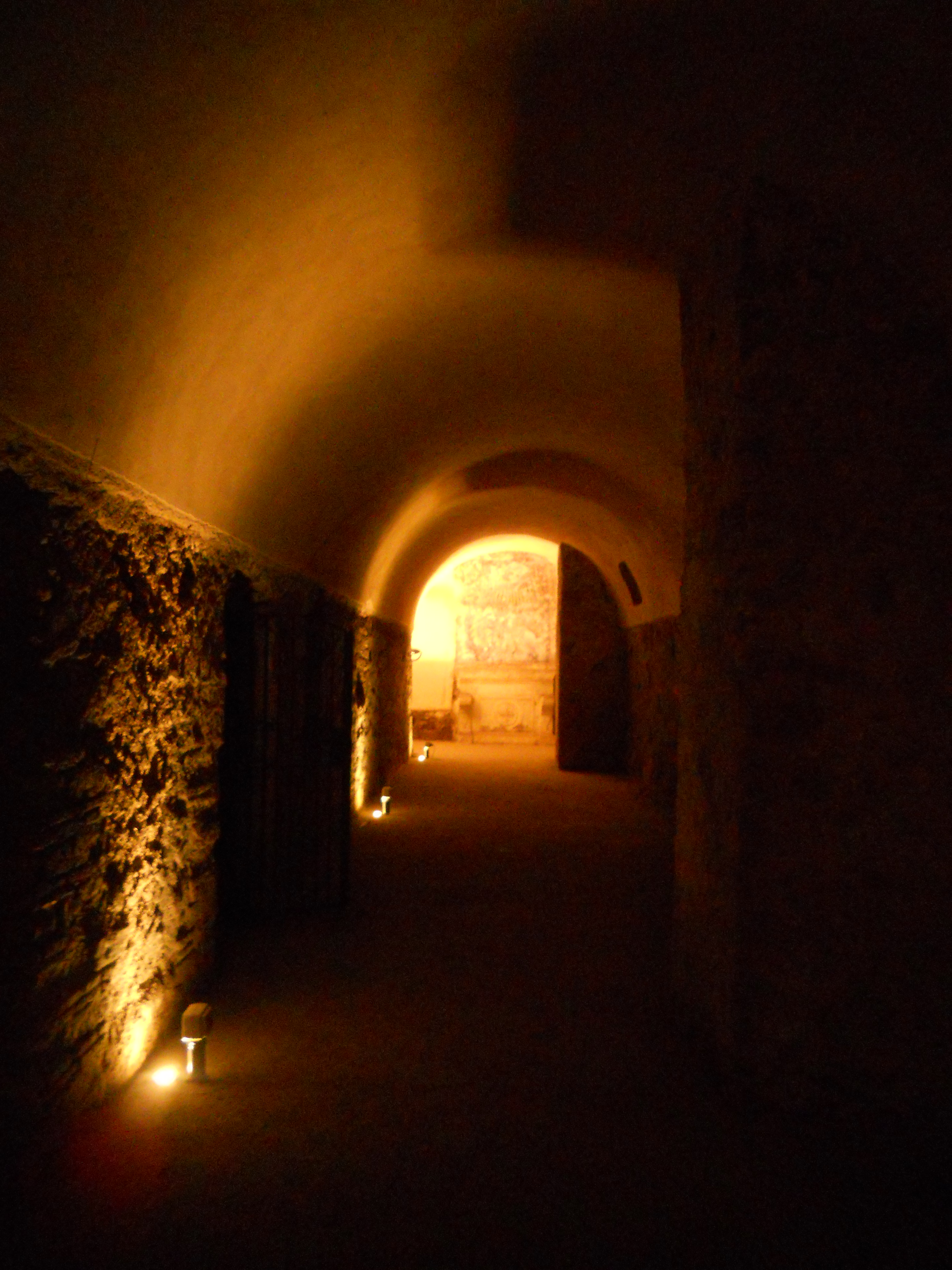 Il lato sud del criptoportico della Villa romana di Sava di Baronissi.